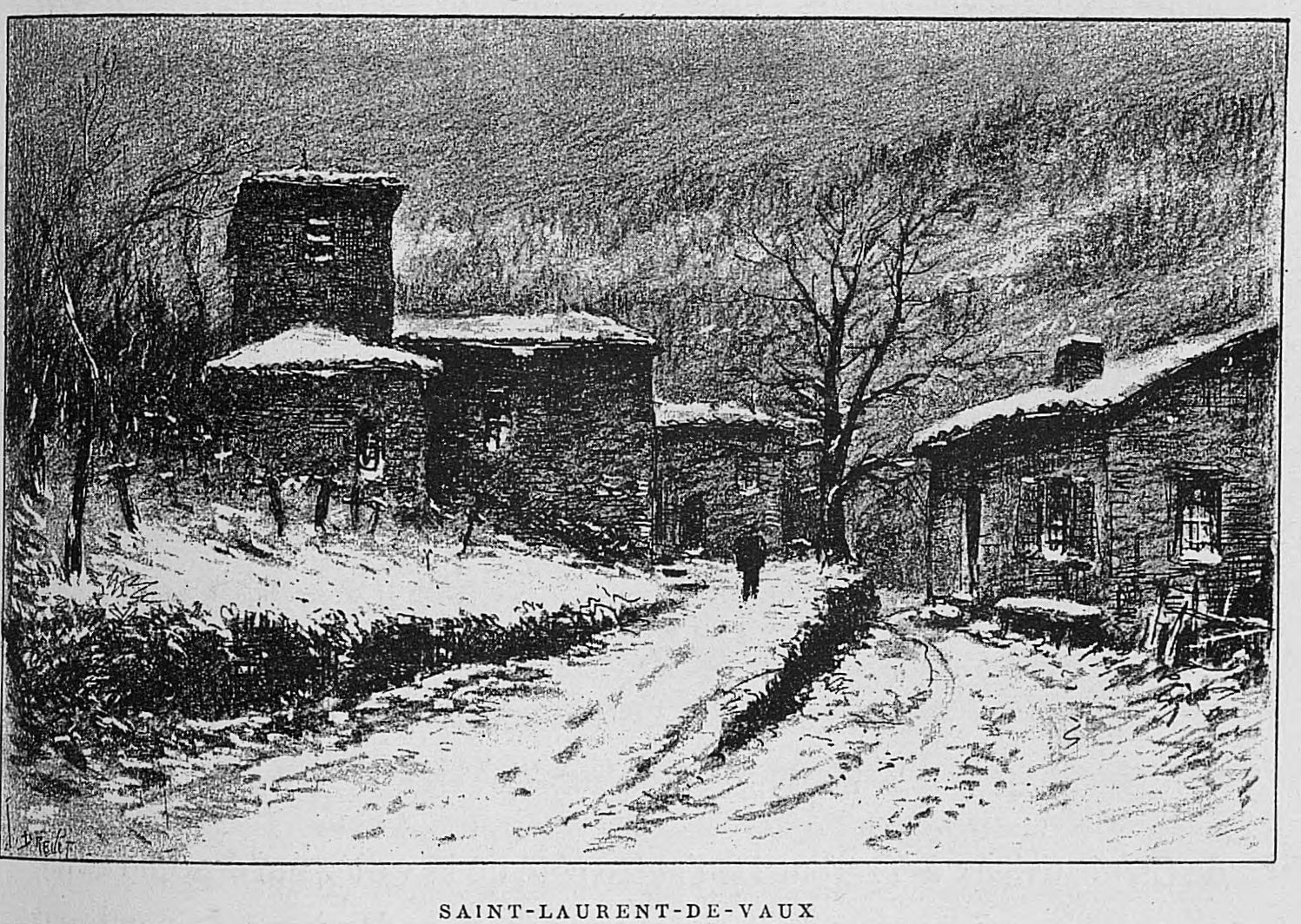 Aux environs de Lyon / Monsieur Josse ; préface de M. Coste-Labaume ; édition illustrée de 250 dessins de J. Drevet.